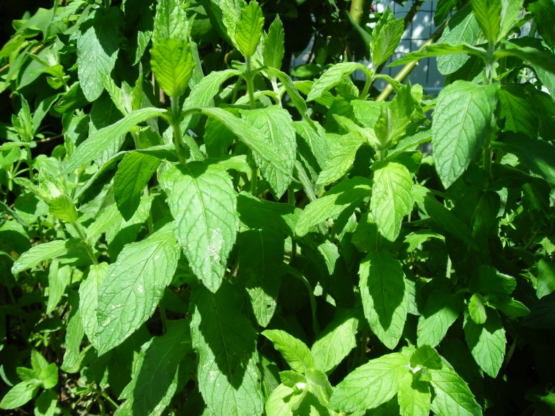 Menthe aromatique